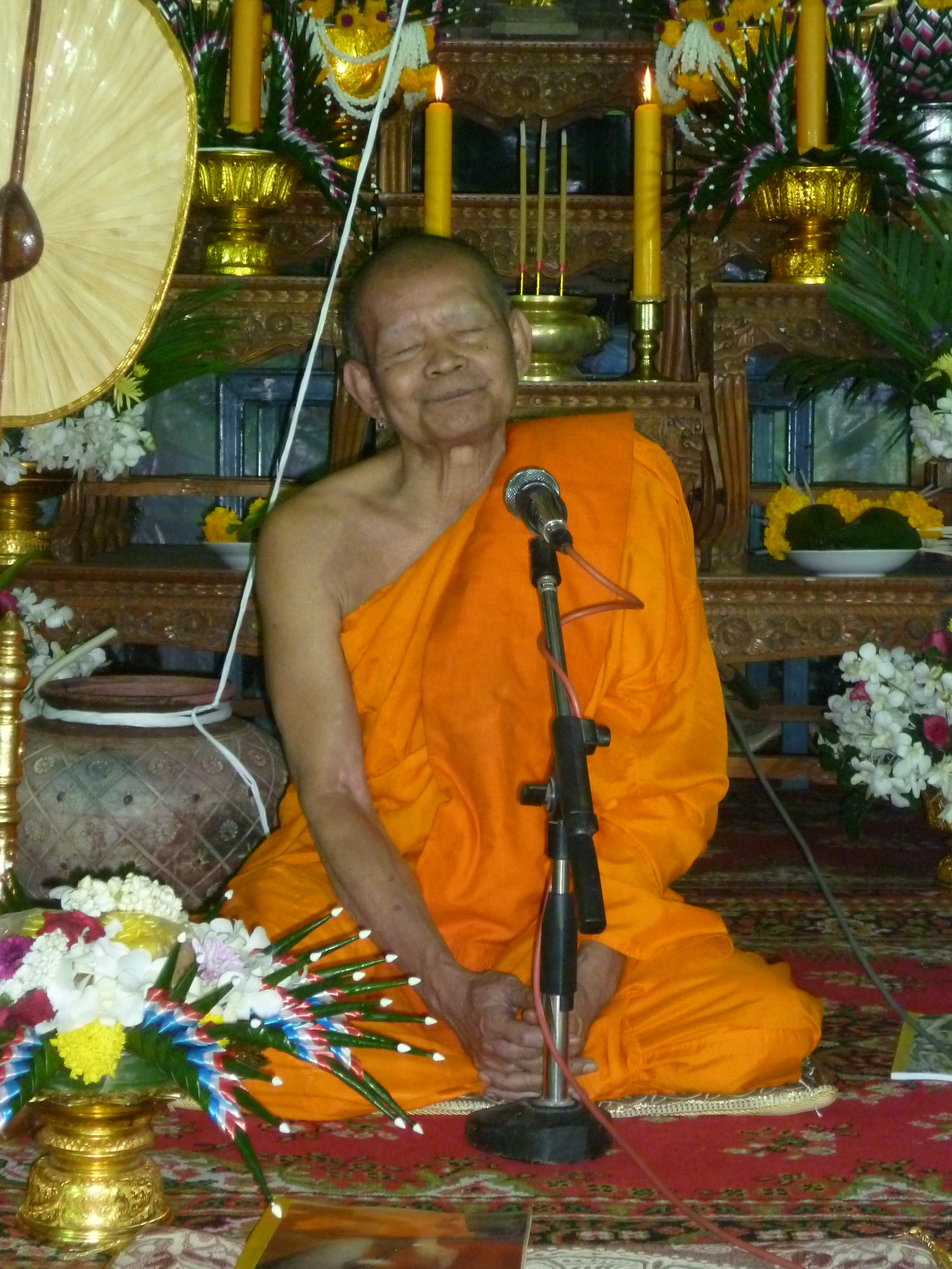 เจ้าคณะตำบลเบิกไพร-ลาดบัวขาว เจ้าอาวาสวัดปลักแรด